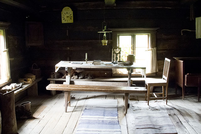 Esineistöä